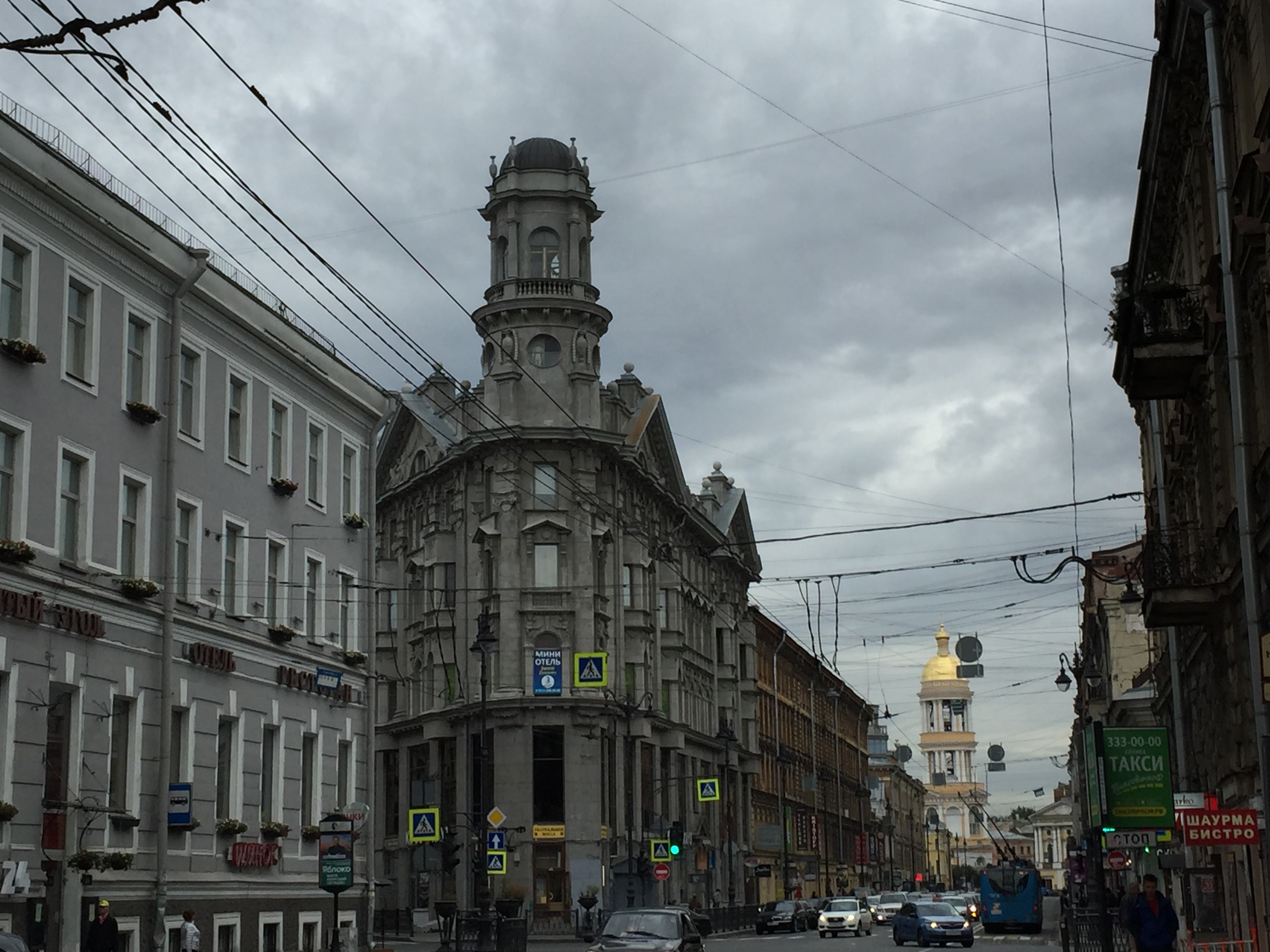 Пять углов